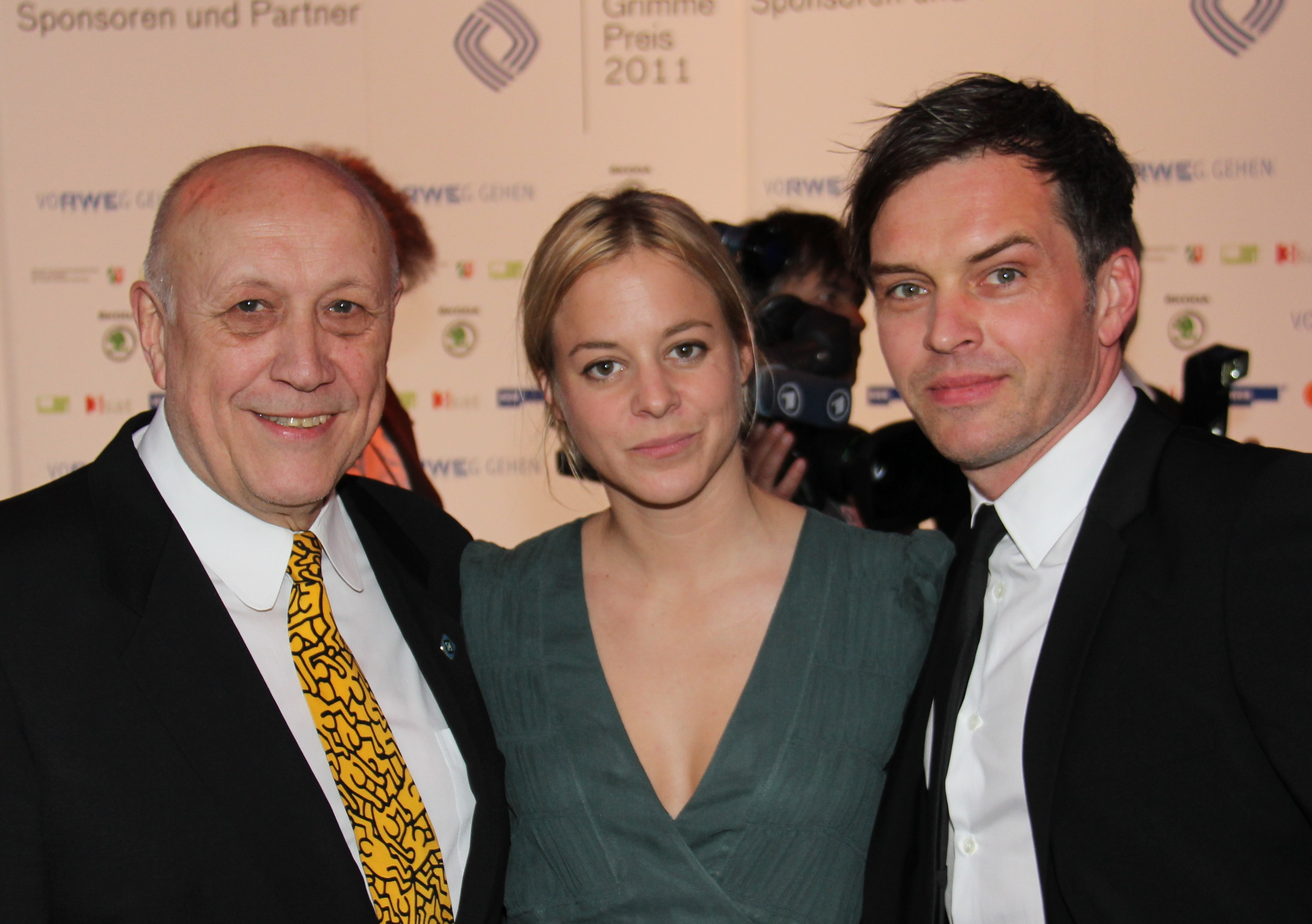 Ulrich Spies, Bernadette Heerwagen und Ole Puppe bei der Verleihung des Grimme-Preises 2011